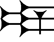 Cuneiform sign